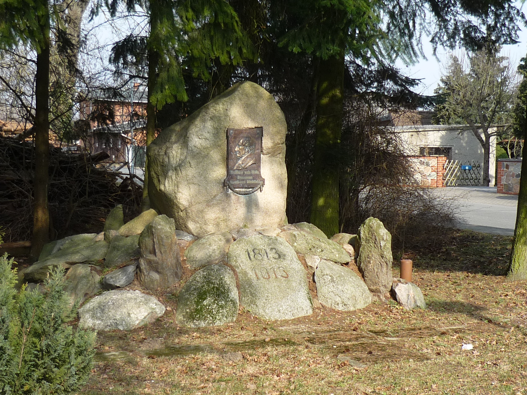 Freiherr-vom-Stein- Denkmal in Nebelin (Prignitz), erbaut 1913